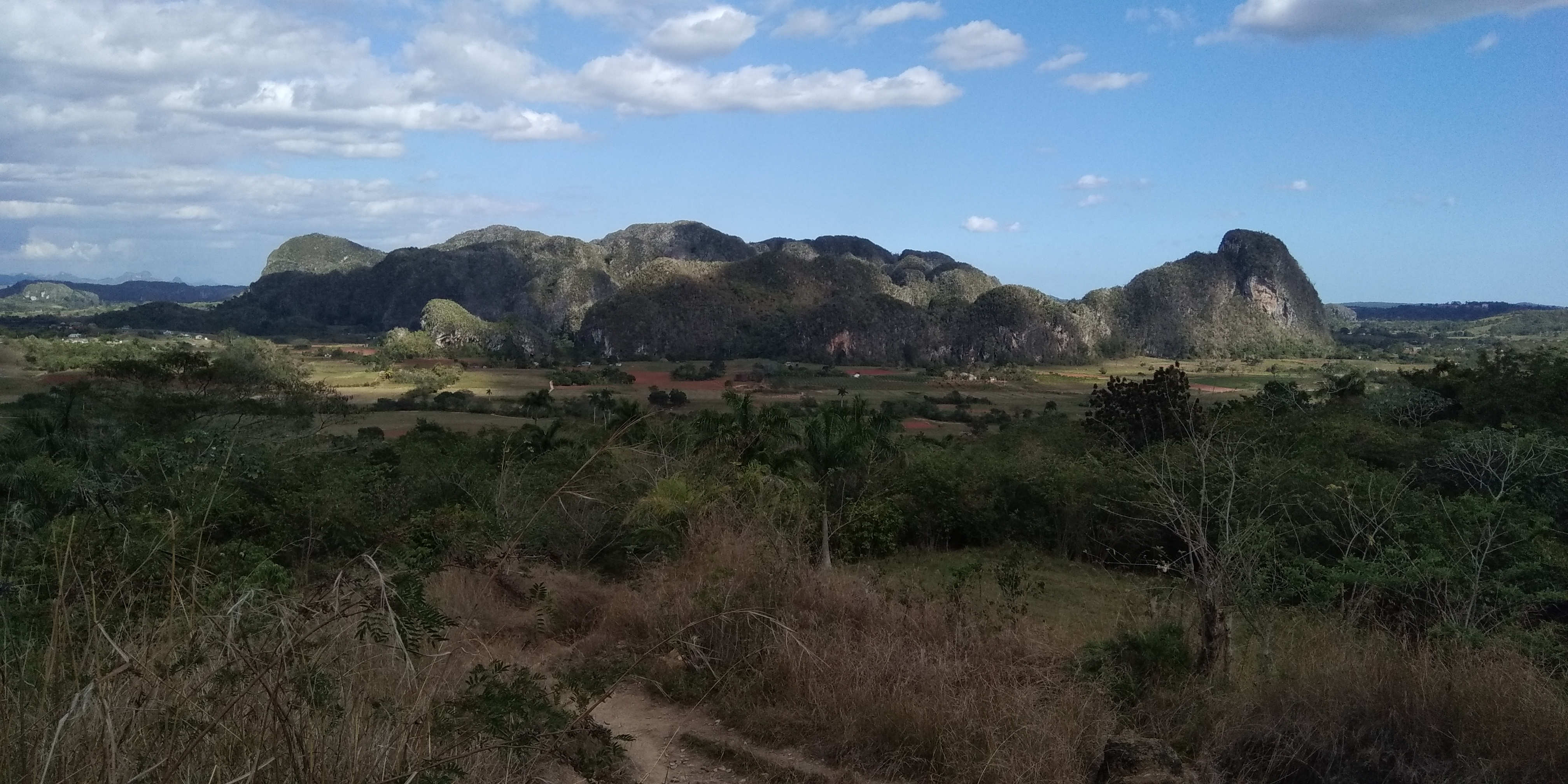 Mogote de Dos Hermanos et Mogote del Valle, vue depuis Los Aquaticos.